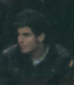 Oğuzhan kayar